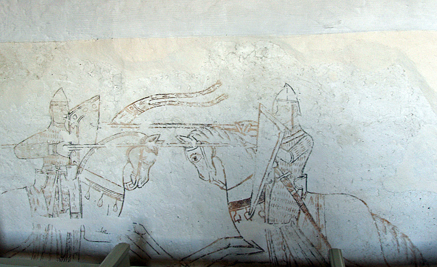 Kalkmaler, Lyngby Kirke, Århus Kommune, Denmark